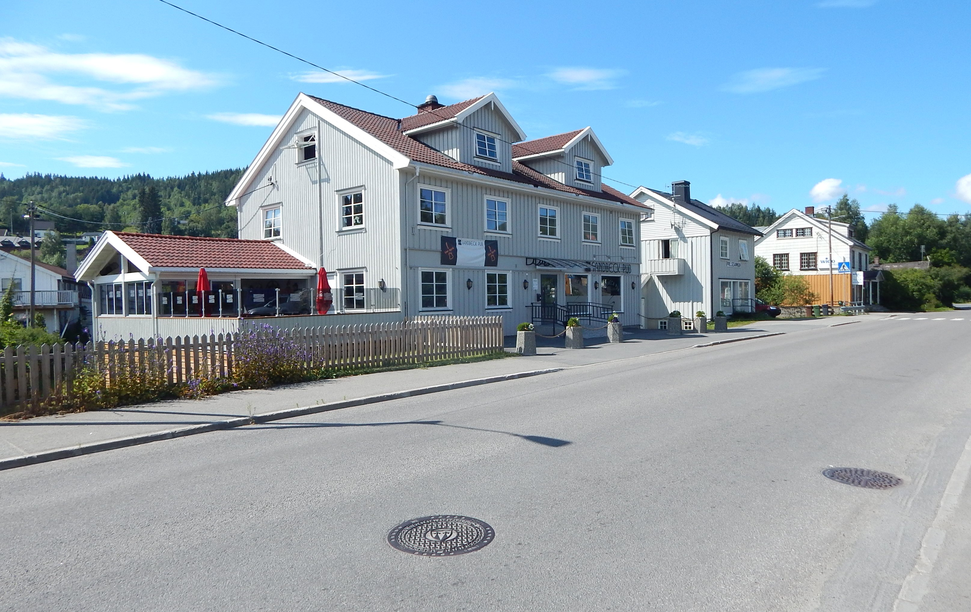 Storlinna på Brandbu